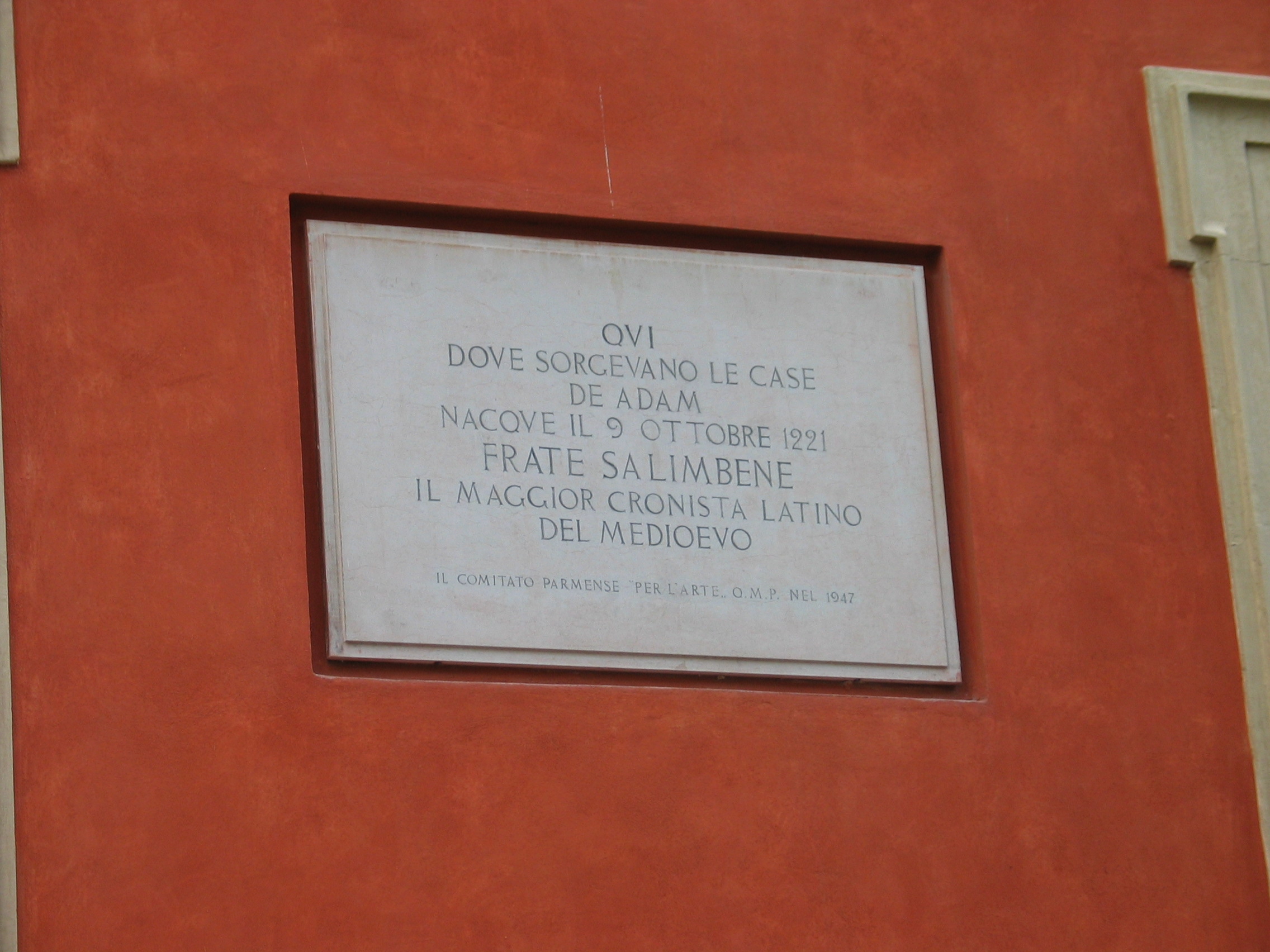 plaque commérative sur la maison de naissance de Fra Salimbene de Adam